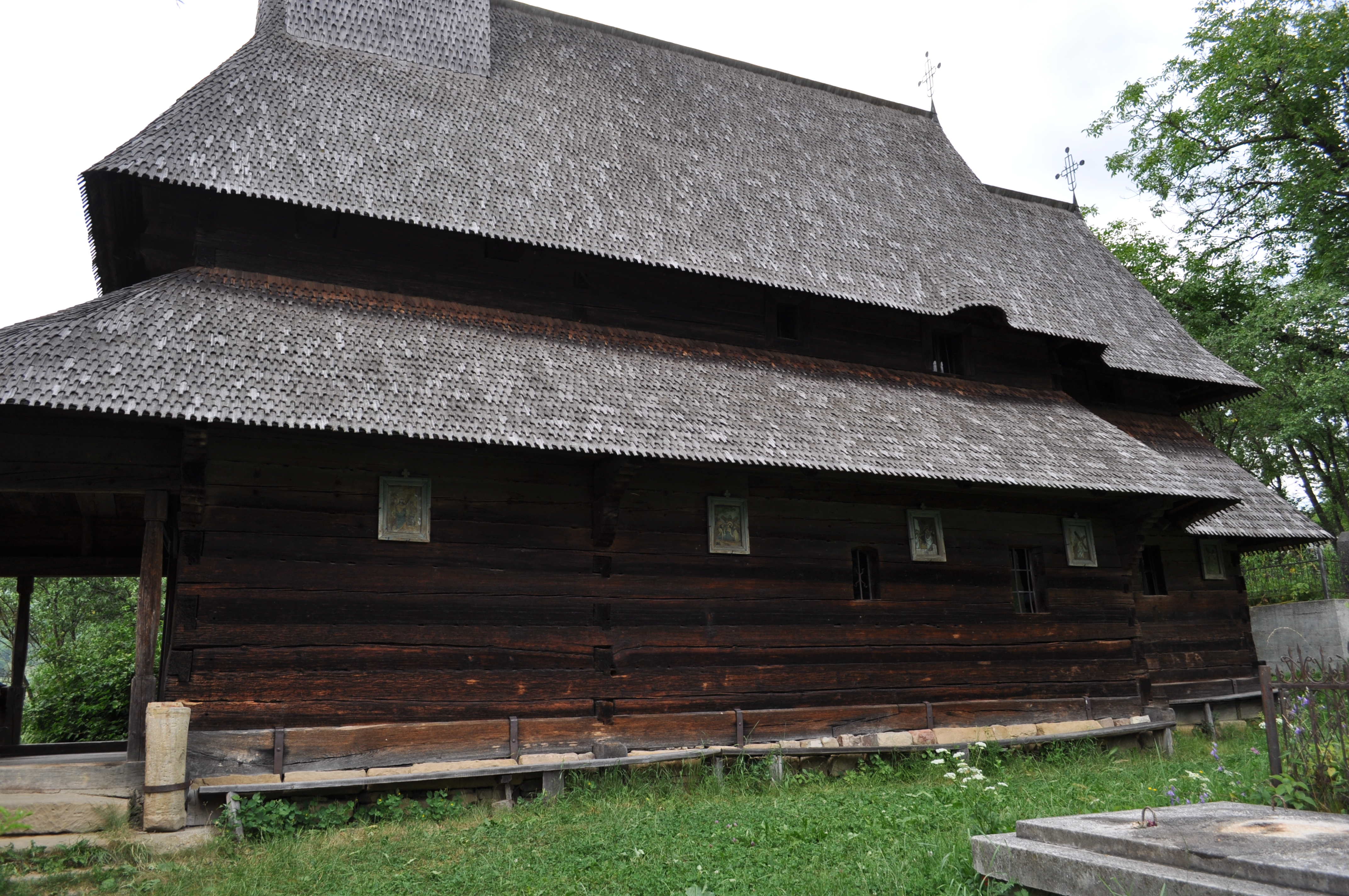 Biserica de lemn "Cuvioasa Paraschiva" , sat POIENILE IZEI